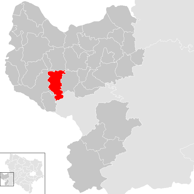 Bezirk Amstetten